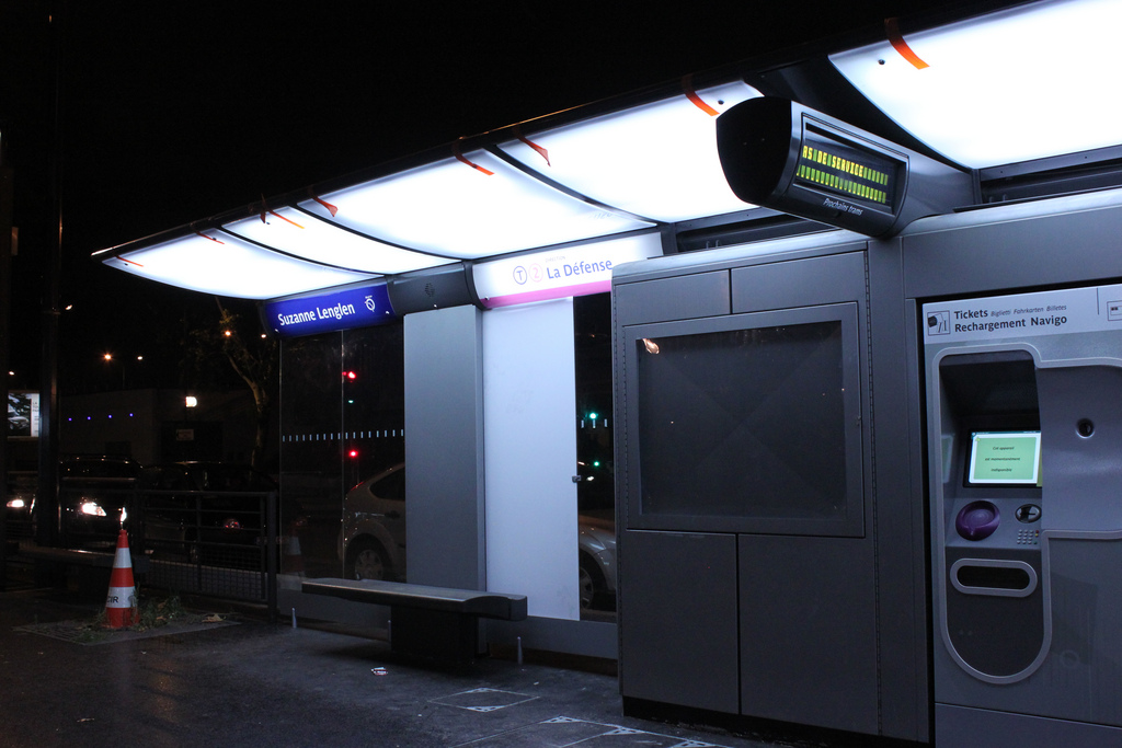 Station Suzanne Lenglen